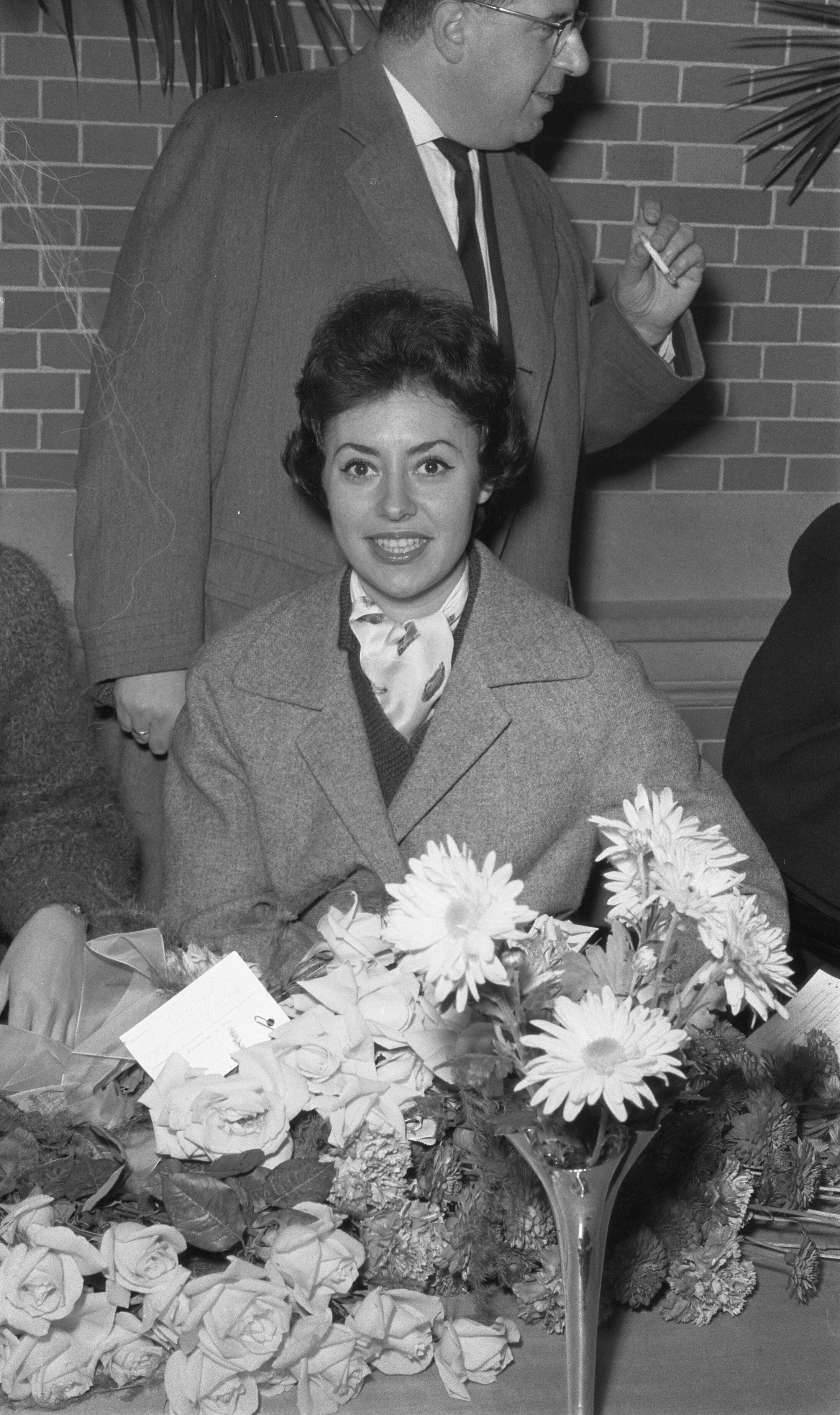 Collectie / Archief : Fotocollectie Anefo Reportage / Serie : [ onbekend ] Beschrijving : Aankomst van zangeres Caterina Valente te Amsterdam Datum : 20 november 1959 Locatie : Amsterdam, Noord-Holland Trefwoorden : portretten, zangeressen Persoonsnaam : Valente, Caterina Fotograaf : Pot, Harry / Anefo Auteursrechthebbende : Nationaal Archief Materiaalsoort : Negatief (zwart/wit) Nummer archiefinventaris : bekijk toegang 2.24.01.05 Bestanddeelnummer : 910-8378